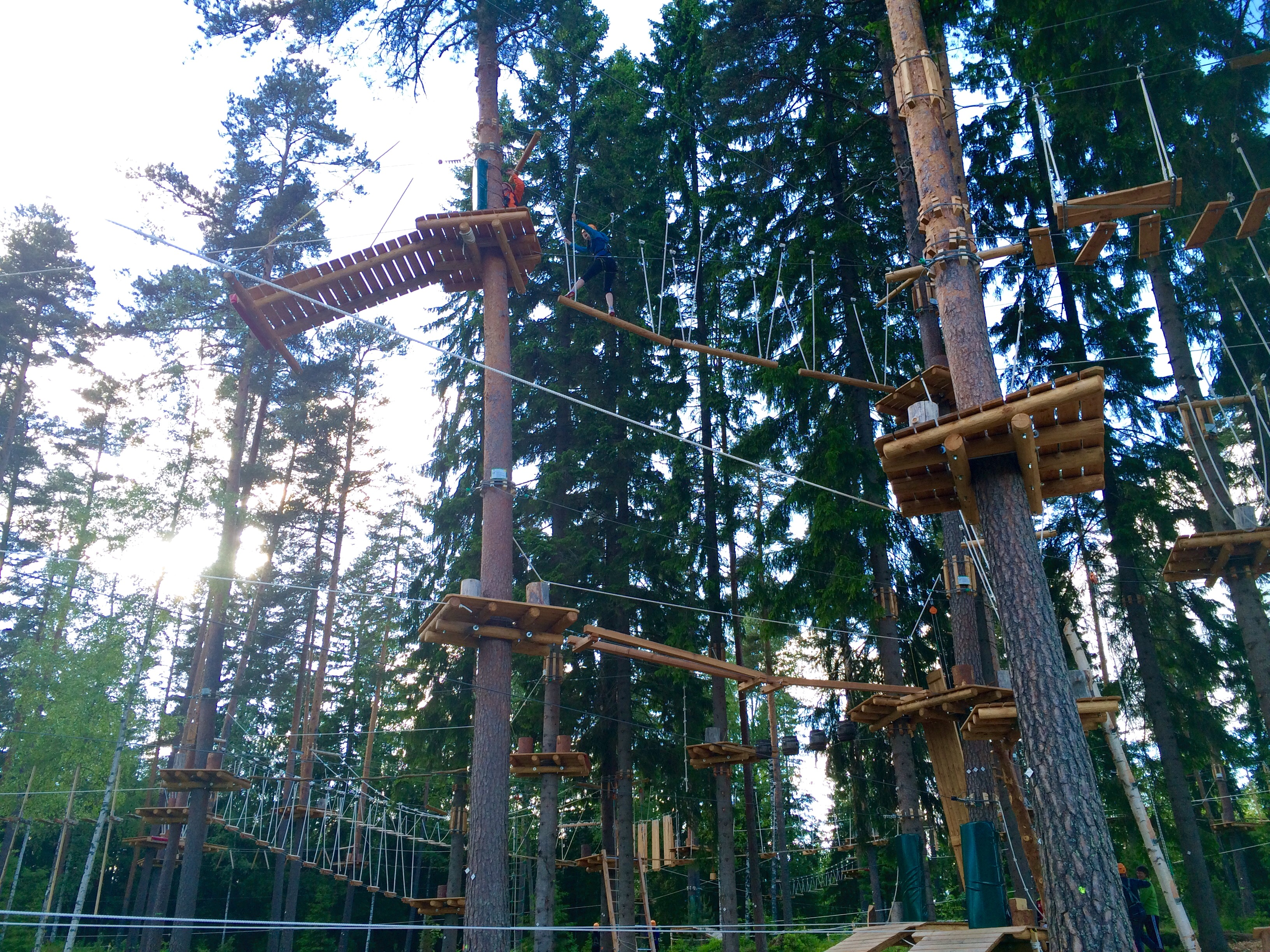 Pajulahden Seikkailupuisto kesäkuussa 2015